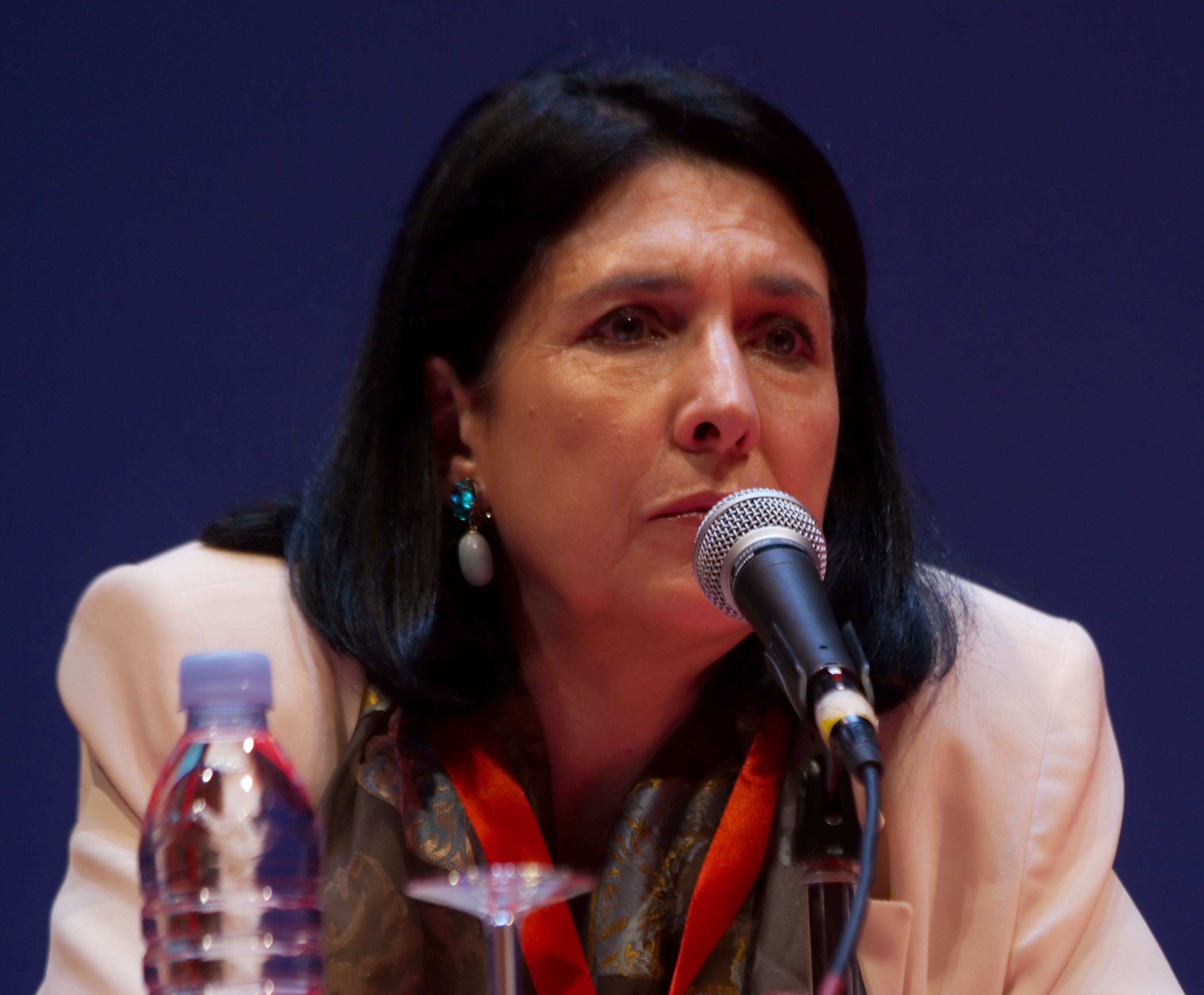 Salomé Zourabichvili au forum Libération 2008, lors d'un débat avec Bernard Guetta